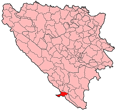 Prikaz općine Neum u Bosni i Hercegovini